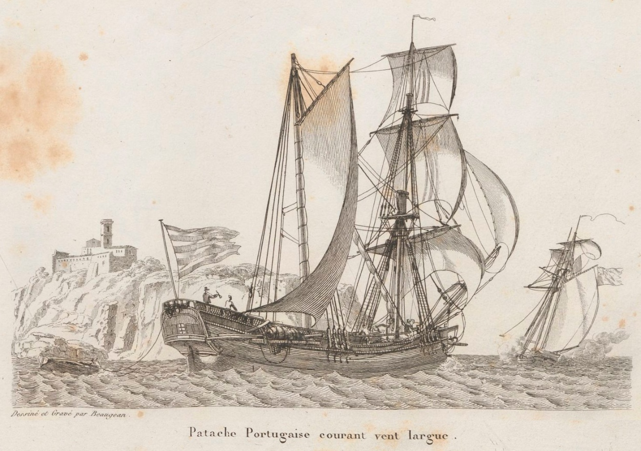 Gravure publiée en 1826 dans la Collection de toutes les espèces de bâtiments de guerre et de bâtiments marchands qui naviguent sur l'Océan et dans la Méditerranée, dessinée d'après nature et gravée par Baugean, mais réalisée avant 1819 (date de la mort de l'auteur).